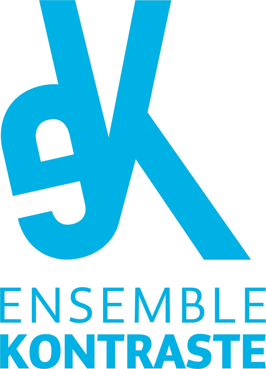 Wikipedia Ensemble KONTRASTE 11